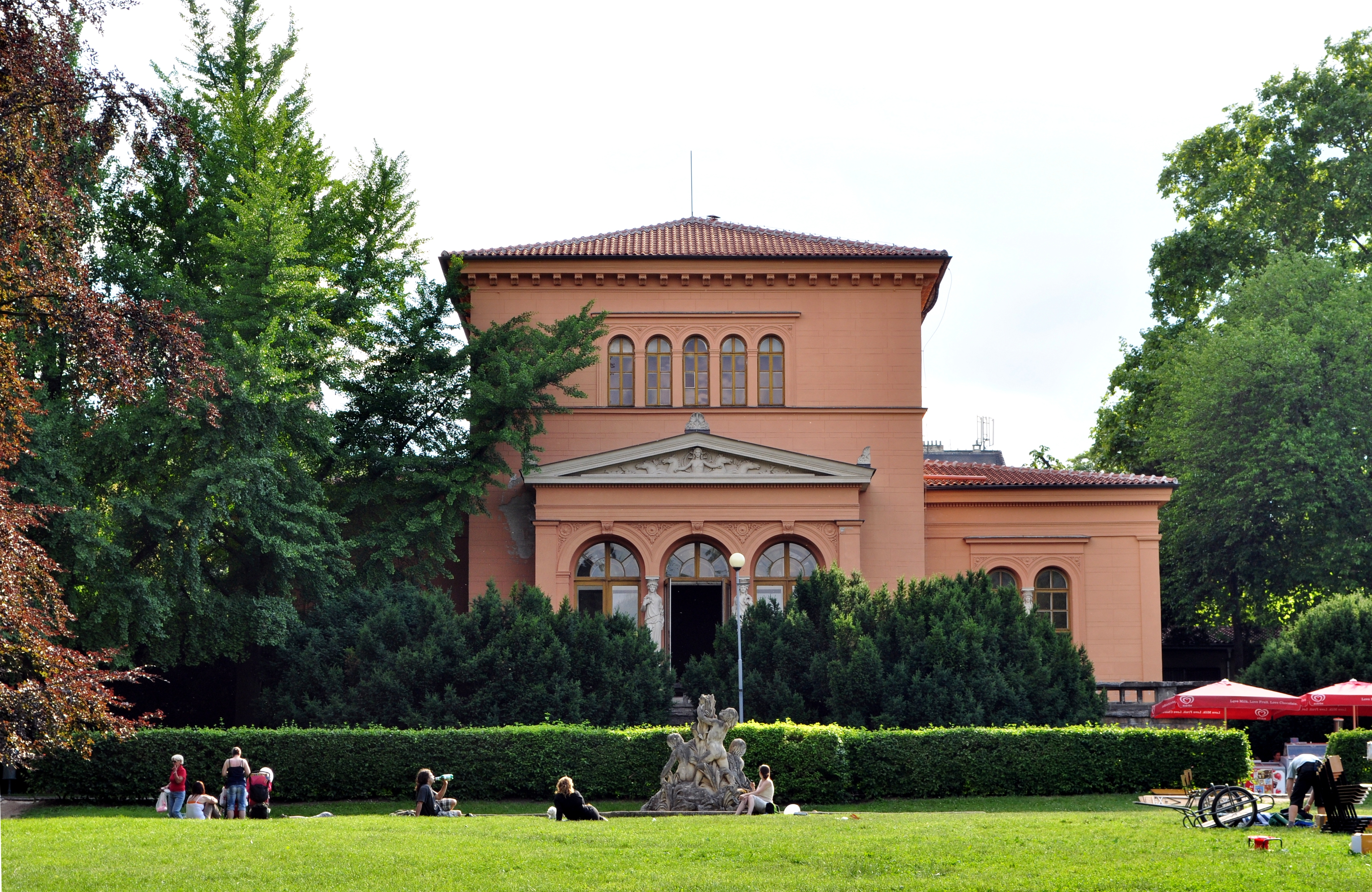 Pavilon v parku Lužánky v Brně